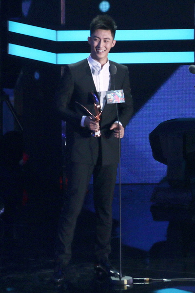 160409 深圳 音乐风云榜 -黄景瑜- 4P